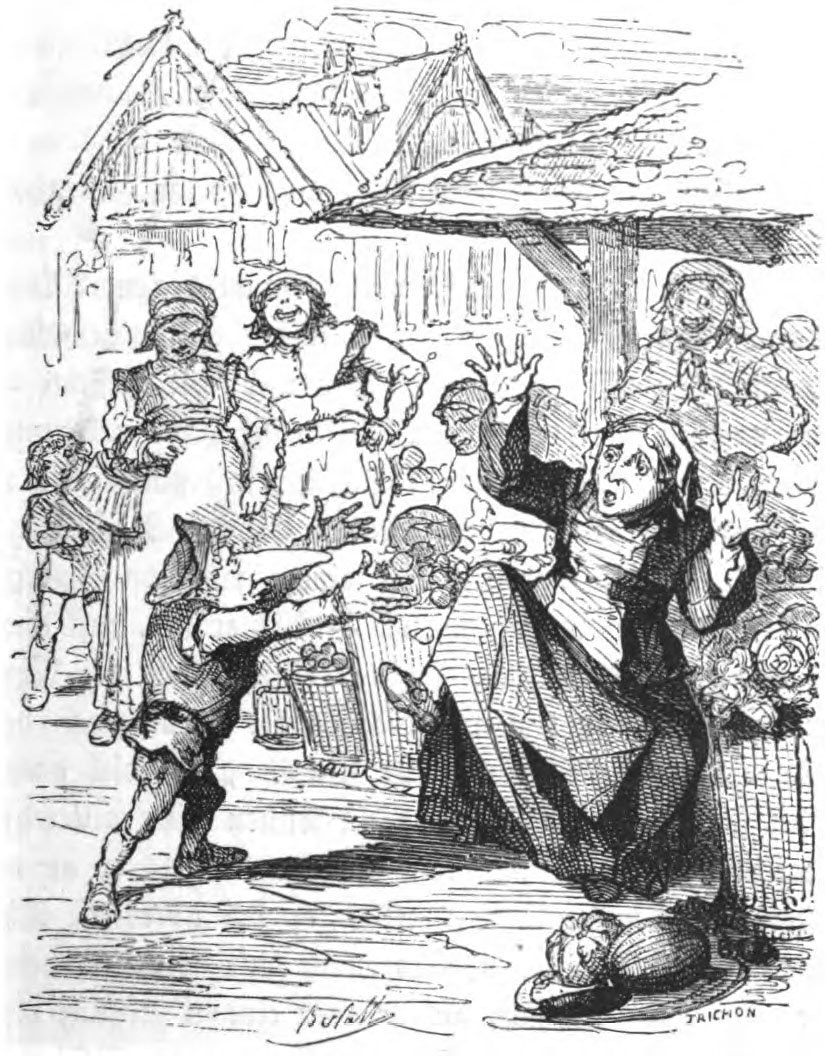 Illustration zu Wilhelm Hauffs Märchen Der Zwerg Nase: Jakob kehrt zu seiner Mutter zurück ohne zu ahnen dass inzwischen sieben Jahre vergangen sind und er ein Zwerg geworden ist